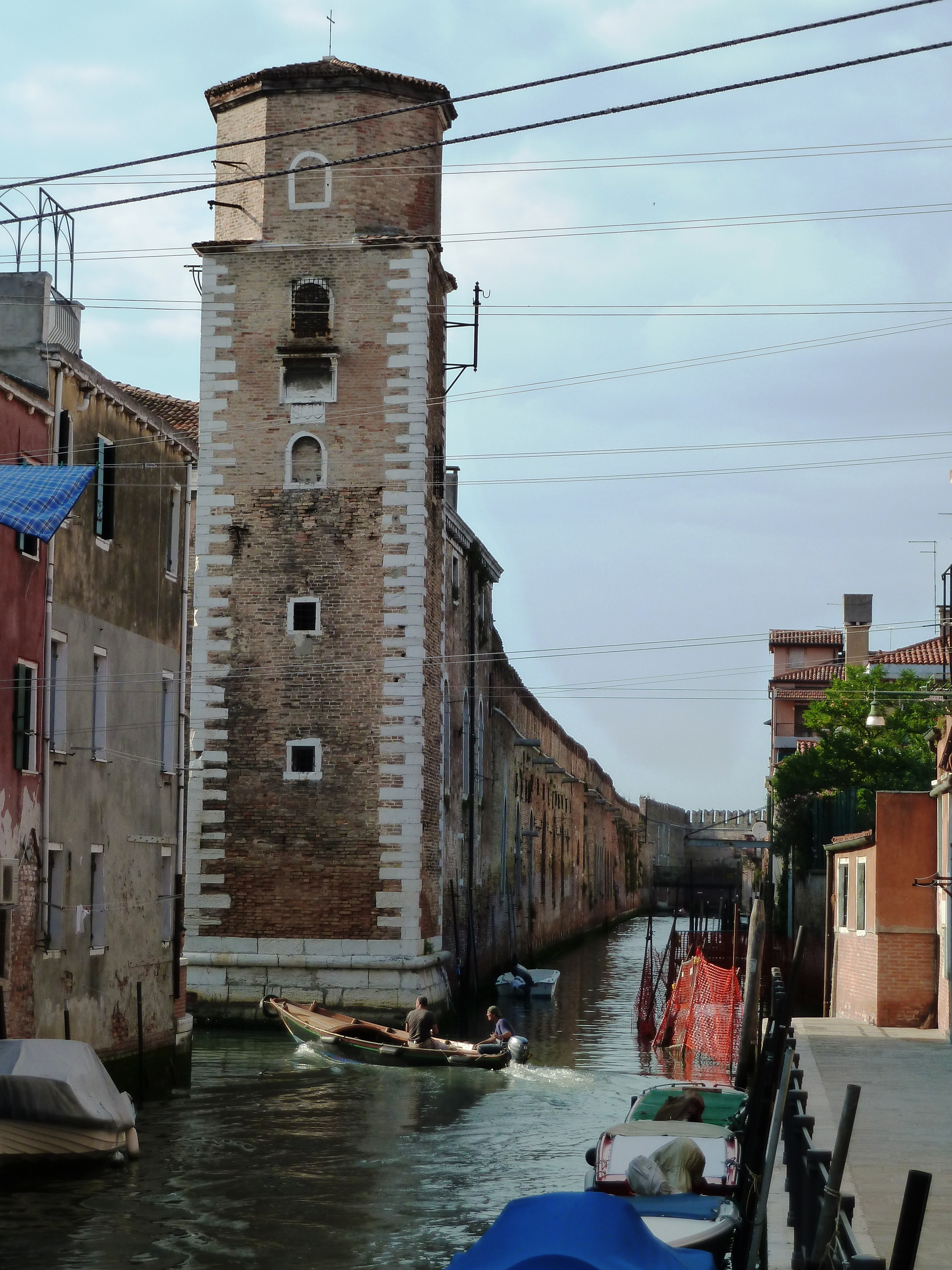 Rio delle Vergini (Venice)